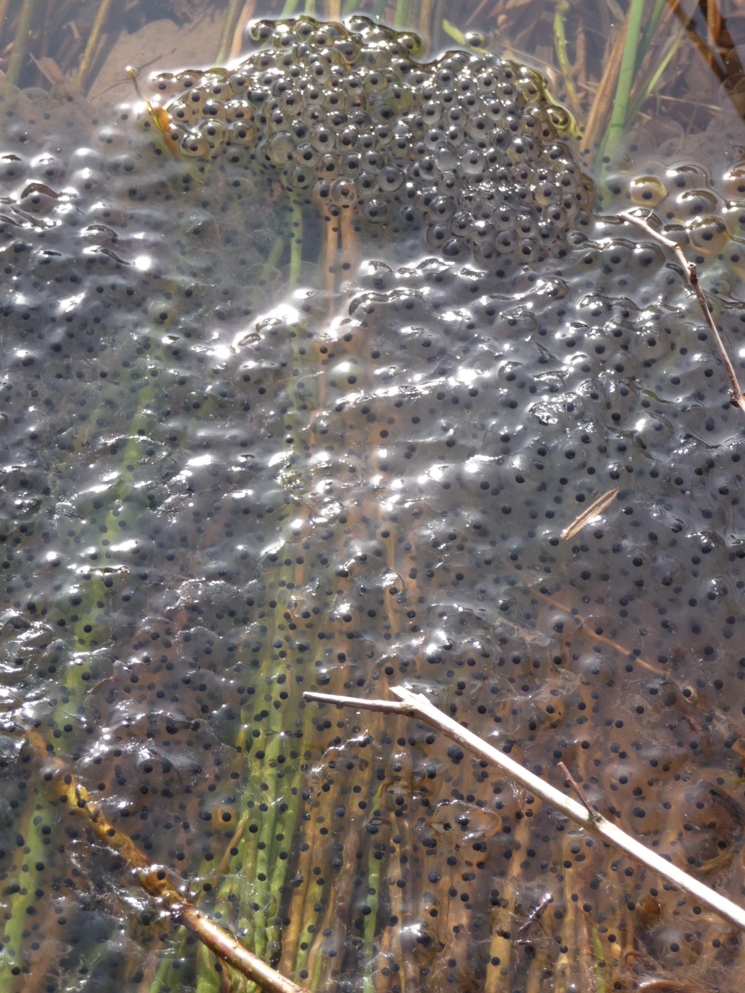 Laich (aufgenommen Mitte März 2009 in einem Teich, der vom Rothenbach in Baden-Baden gespeist wird), wahrscheinlich von mehreren Grasfroschweibchen (Rana temporaria)